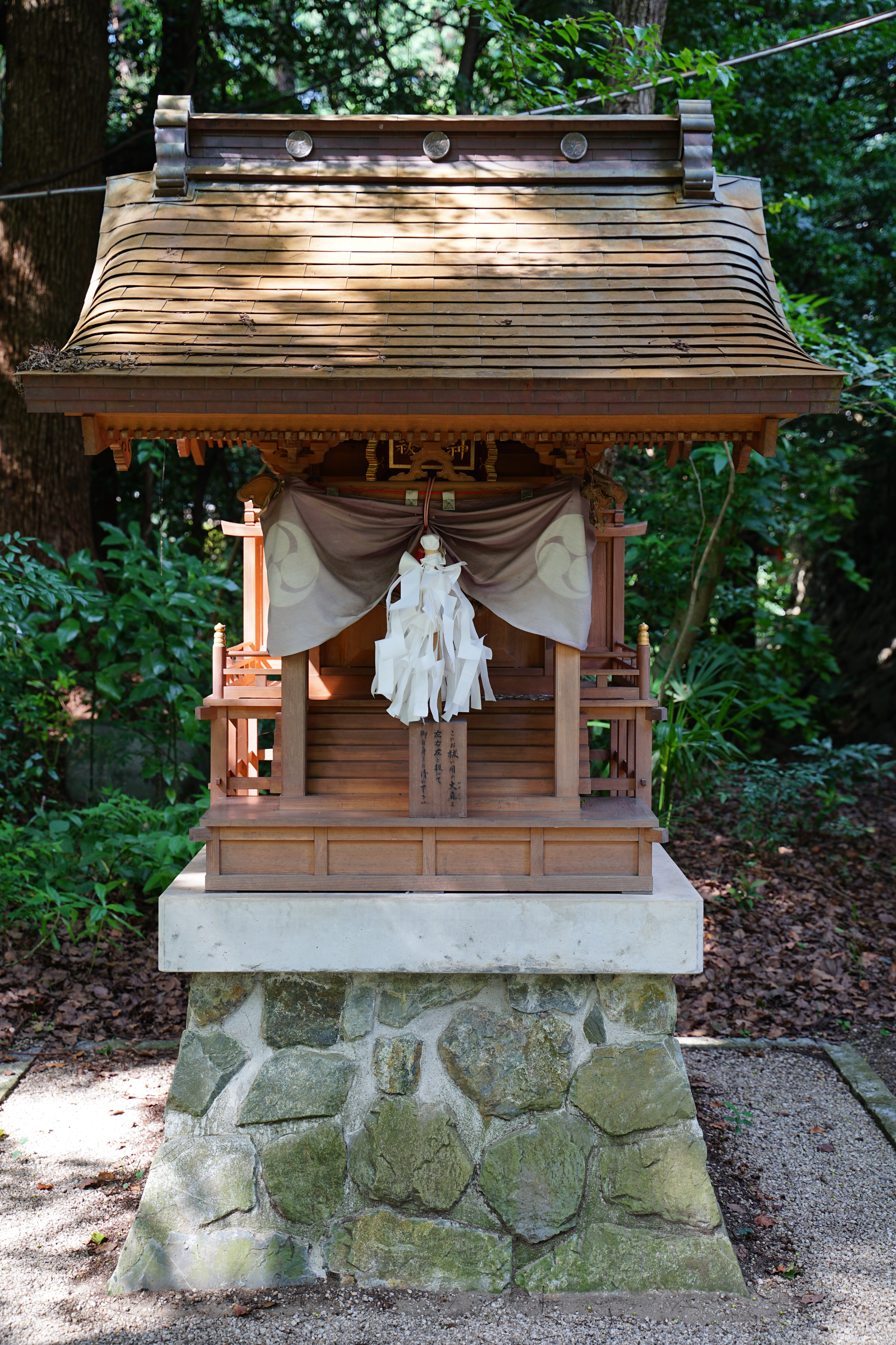 阿伎留神社の祓戸神社